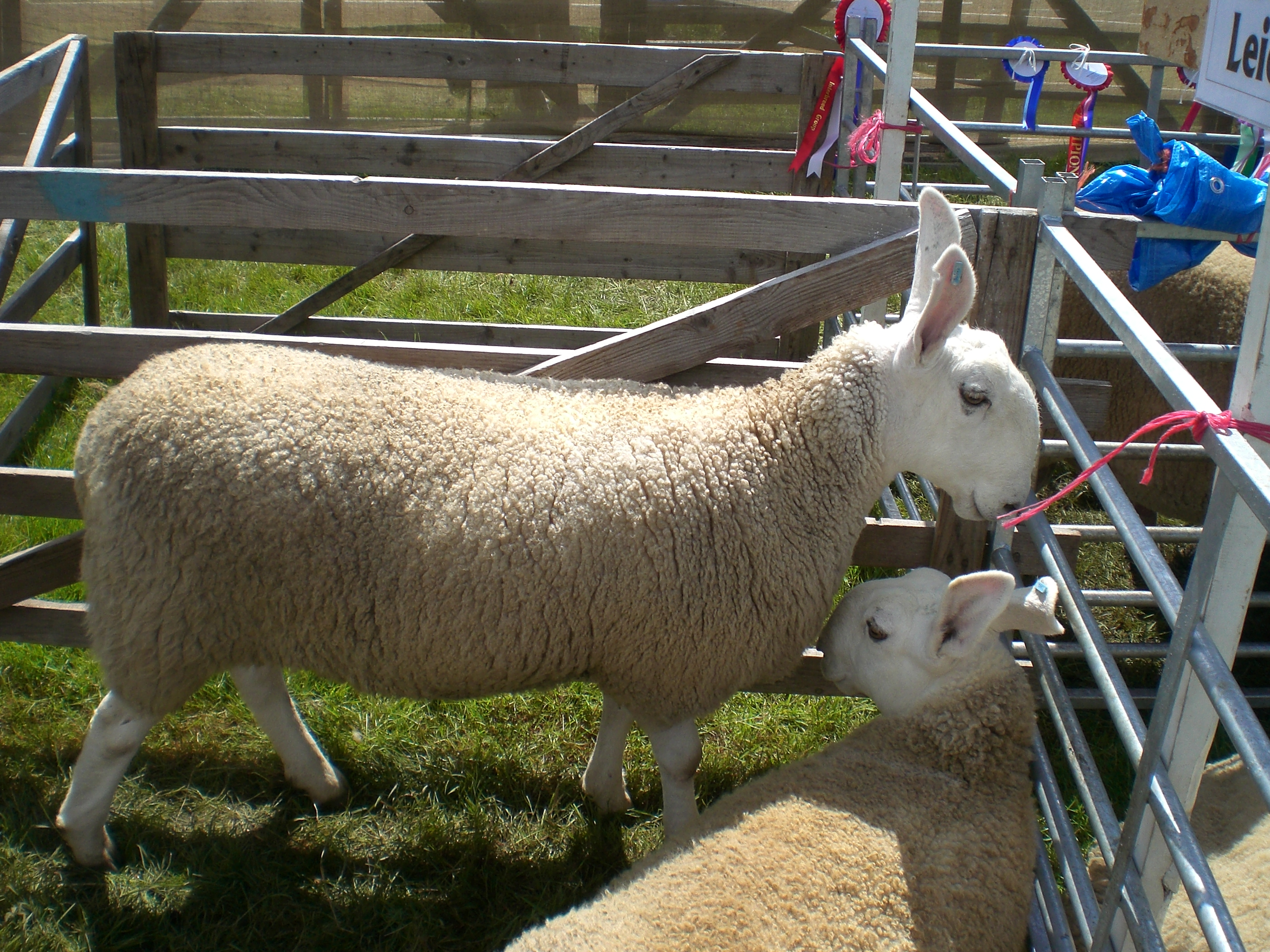 Exemplar de leicester fronteiriza